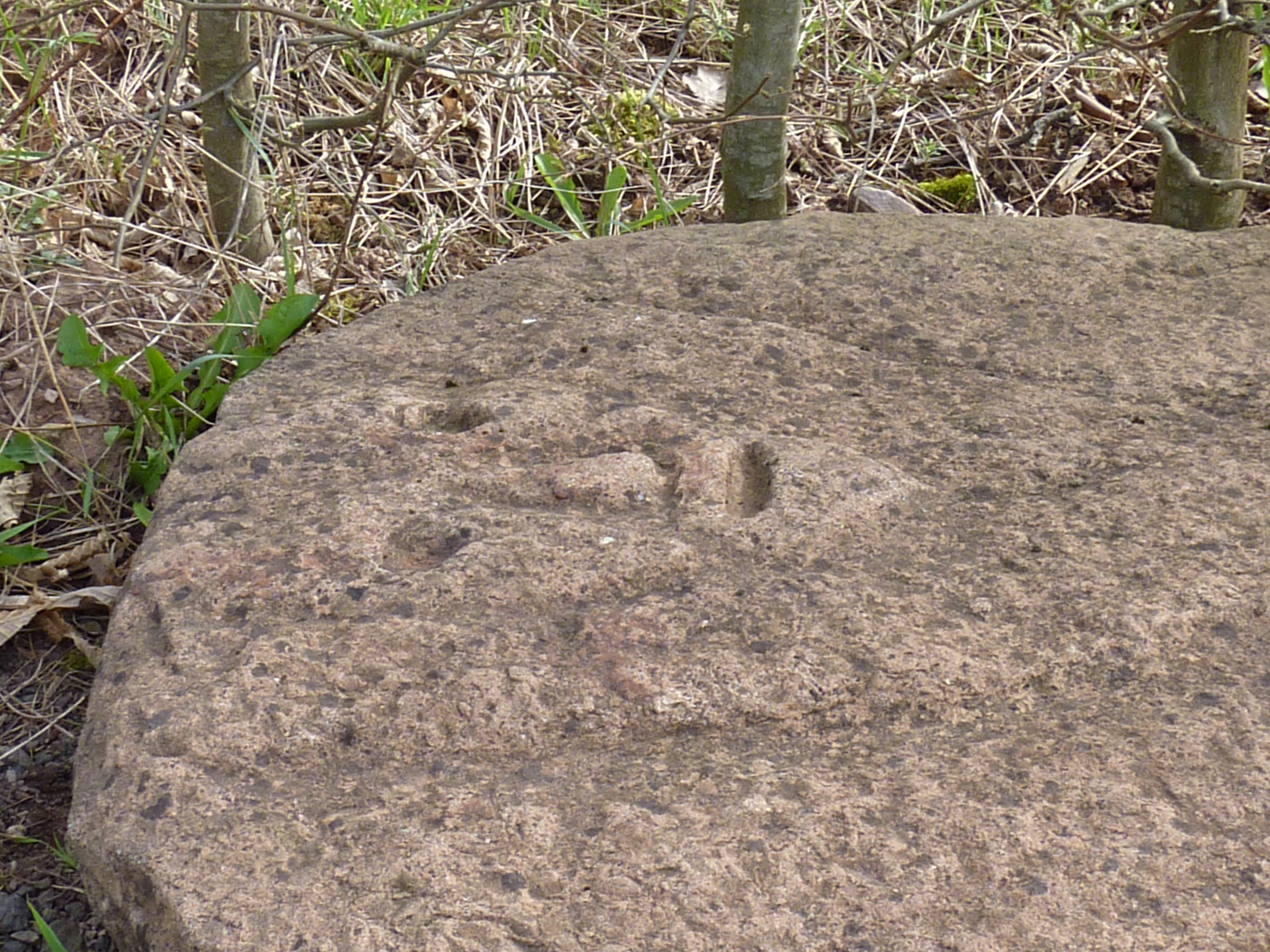 Sarkophagdeckel in Kastel